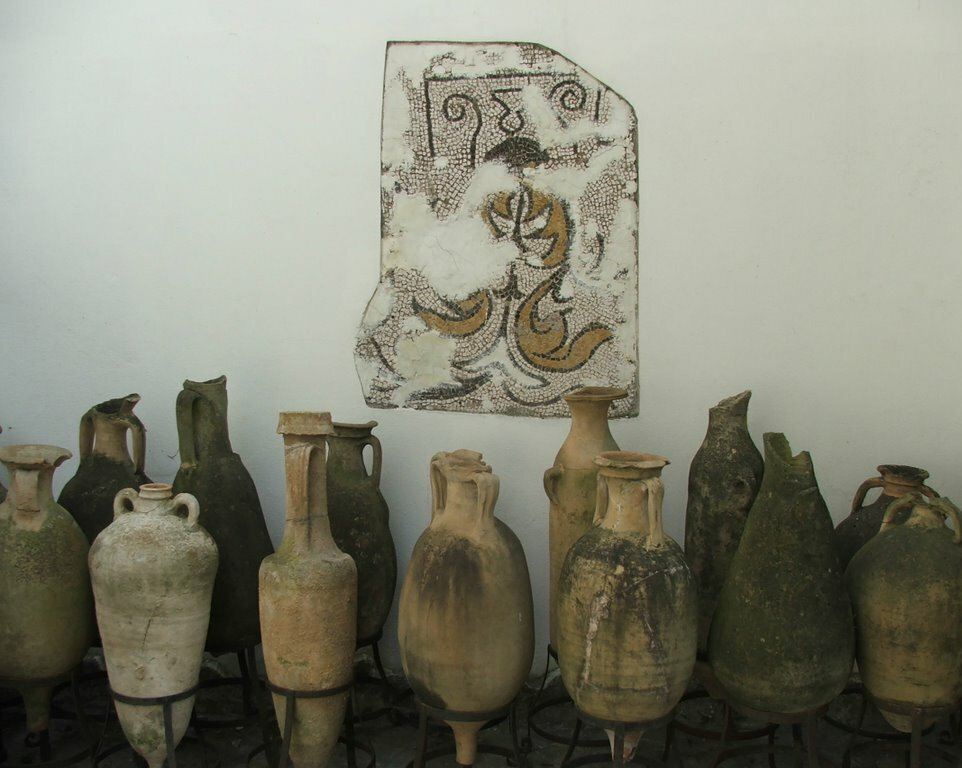 Mosaico romano y colección de ánforas en el Museo Arqueológico de Tetuán